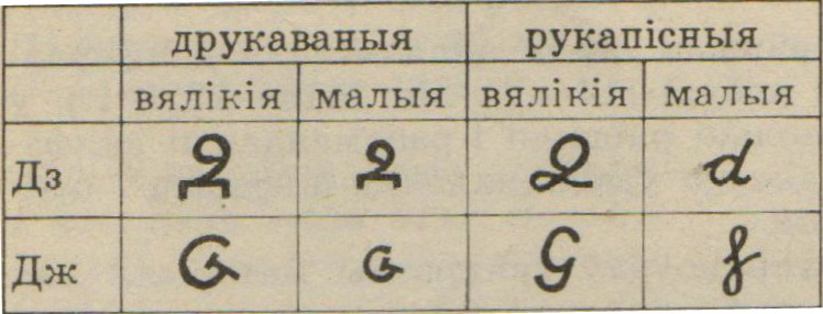 Проект Владимира Дубовки для диграфов дз и дж